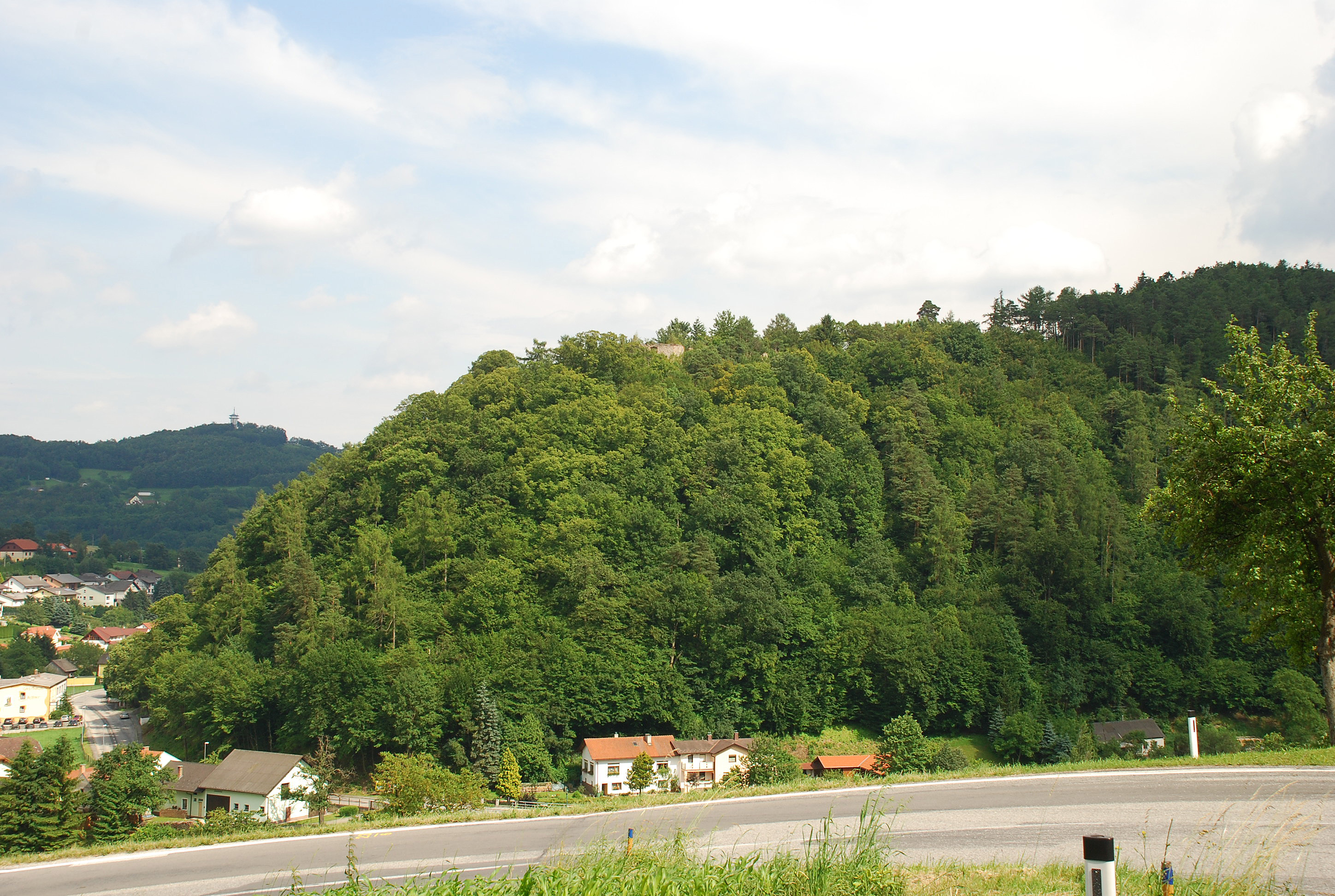 Burgruine Schwarzenbach, Niederösterreich: Burgberg mit Mauerresten vom Norden aus